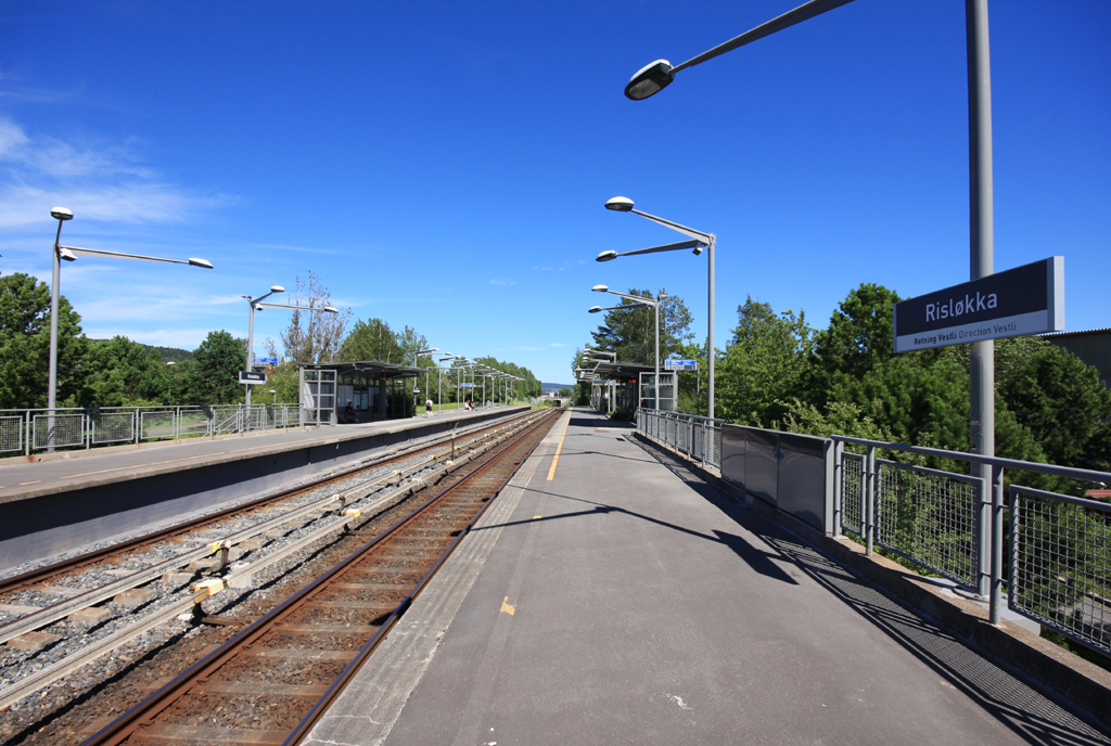 Risløkka T-banestasjon. Sett fra vestlig endedel på Spor 1. Mot Vollebekk.